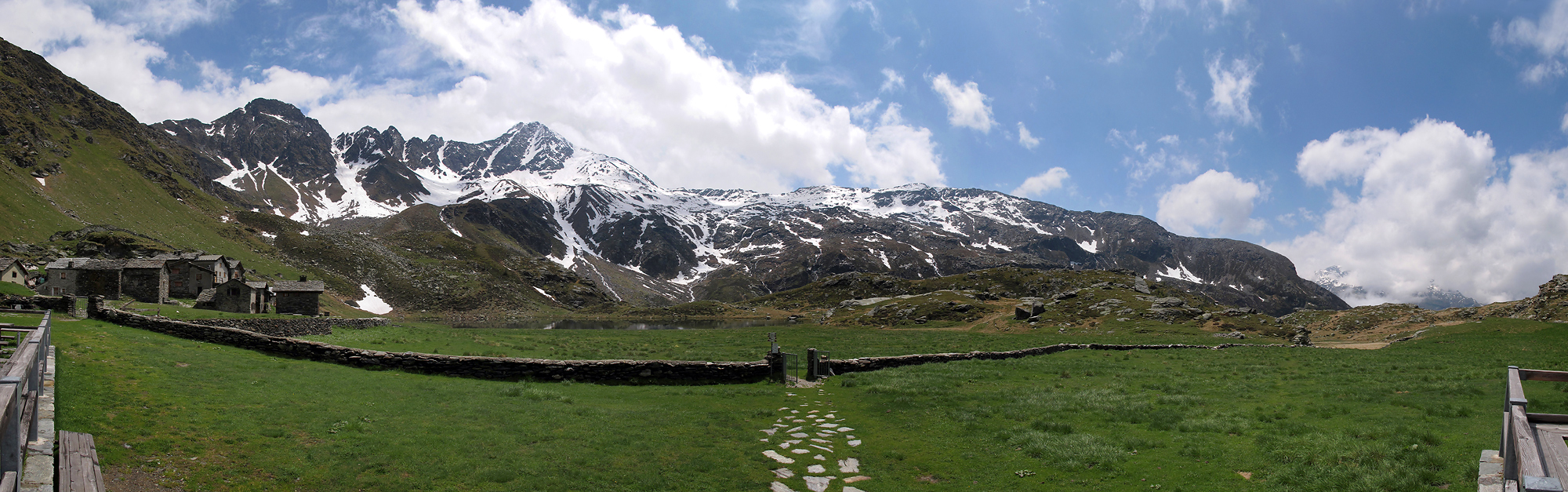 In primo piano il rifugio. Sullo sfondo il Pizzo Stella